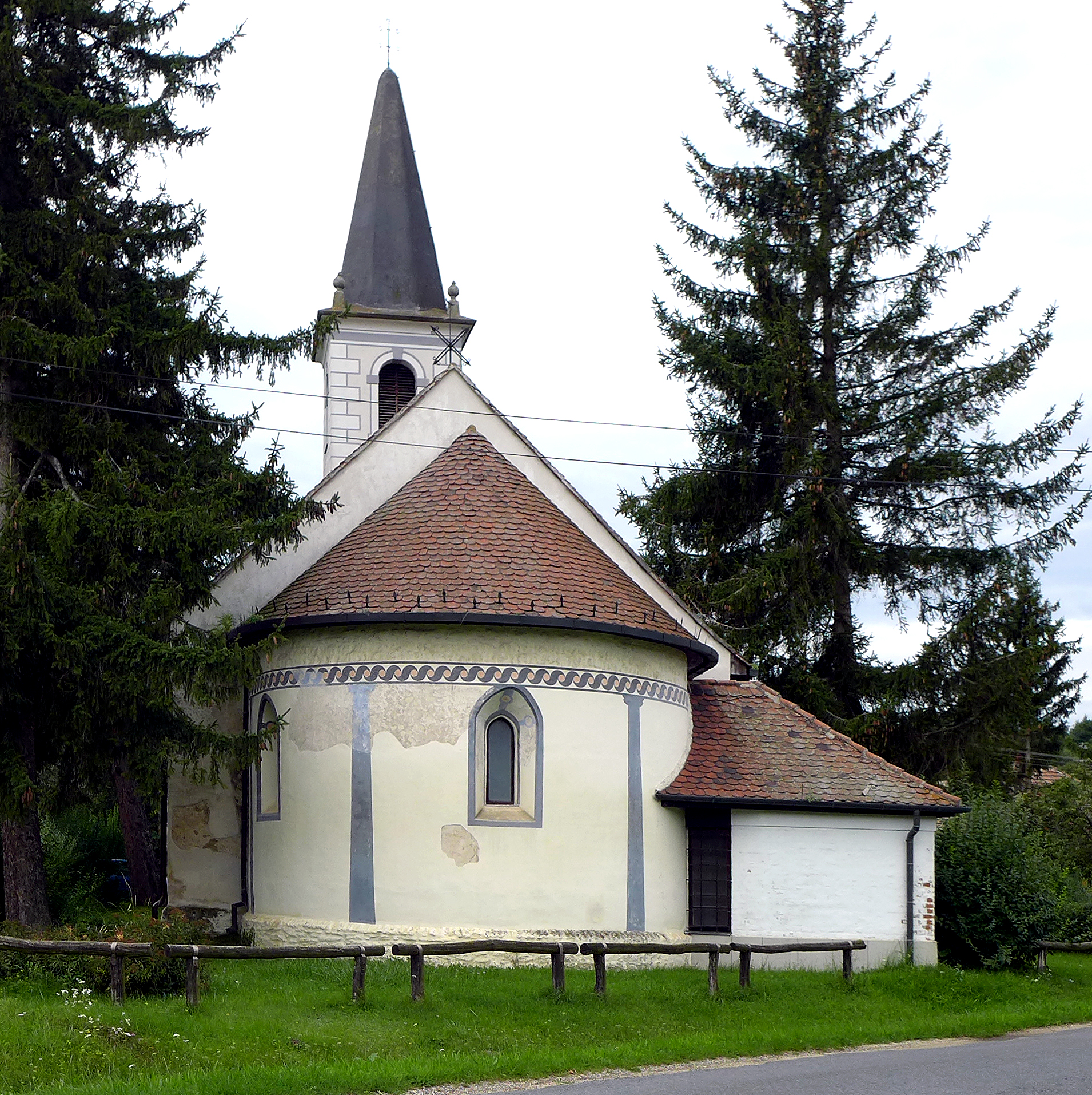 Nagygeresdi Szent István király római katolikus műemléktemplom (szentélye a 13. században épült)